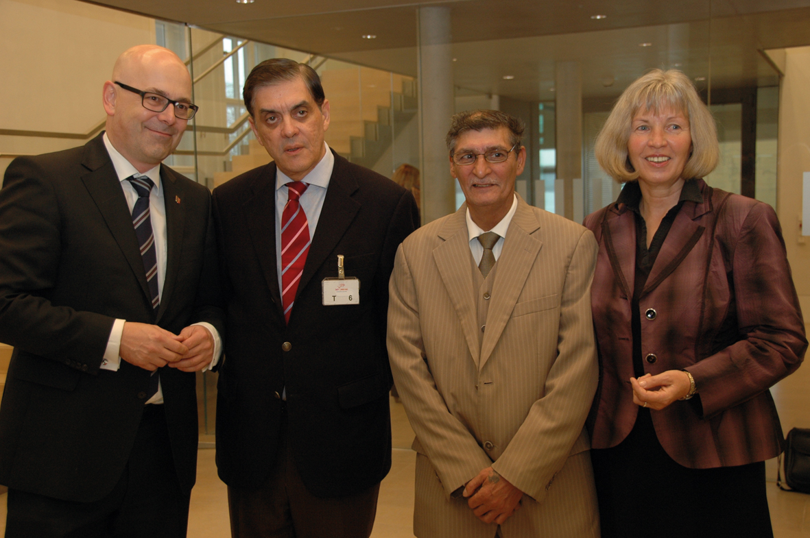 Ergänzung der Schleswig-Holsteinischen Landesverfassung um die Minderheit der deutschen Sinti und Roma: Ministerpräsident Torsten Albig, Romani Rose,, Matthäus Weiß, Minderheitenbeauftragte Renate Schnack (v.l.n.r.)